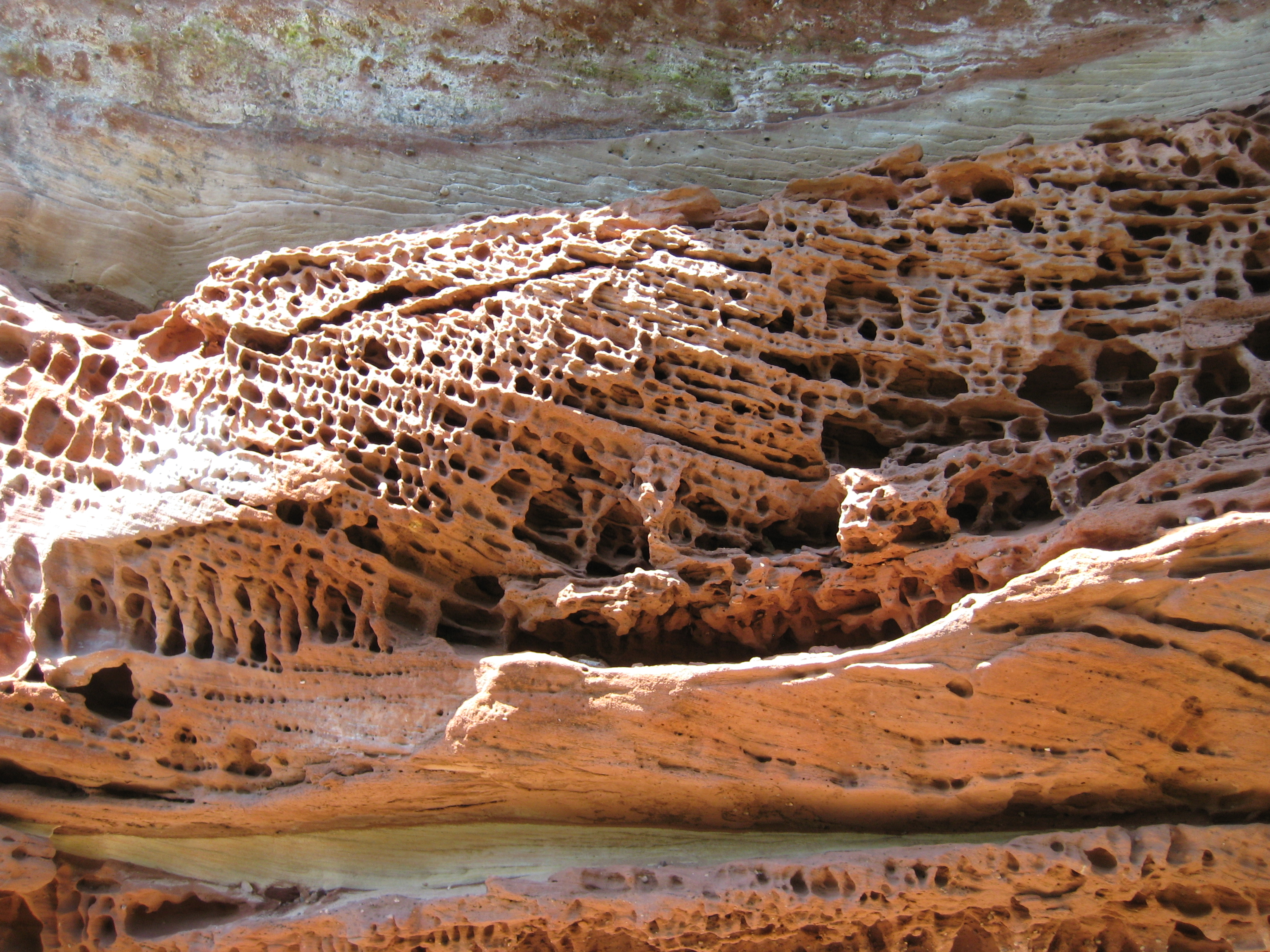 Wabenverwitterung auf Burf Altdahn im Pfälzer Wald